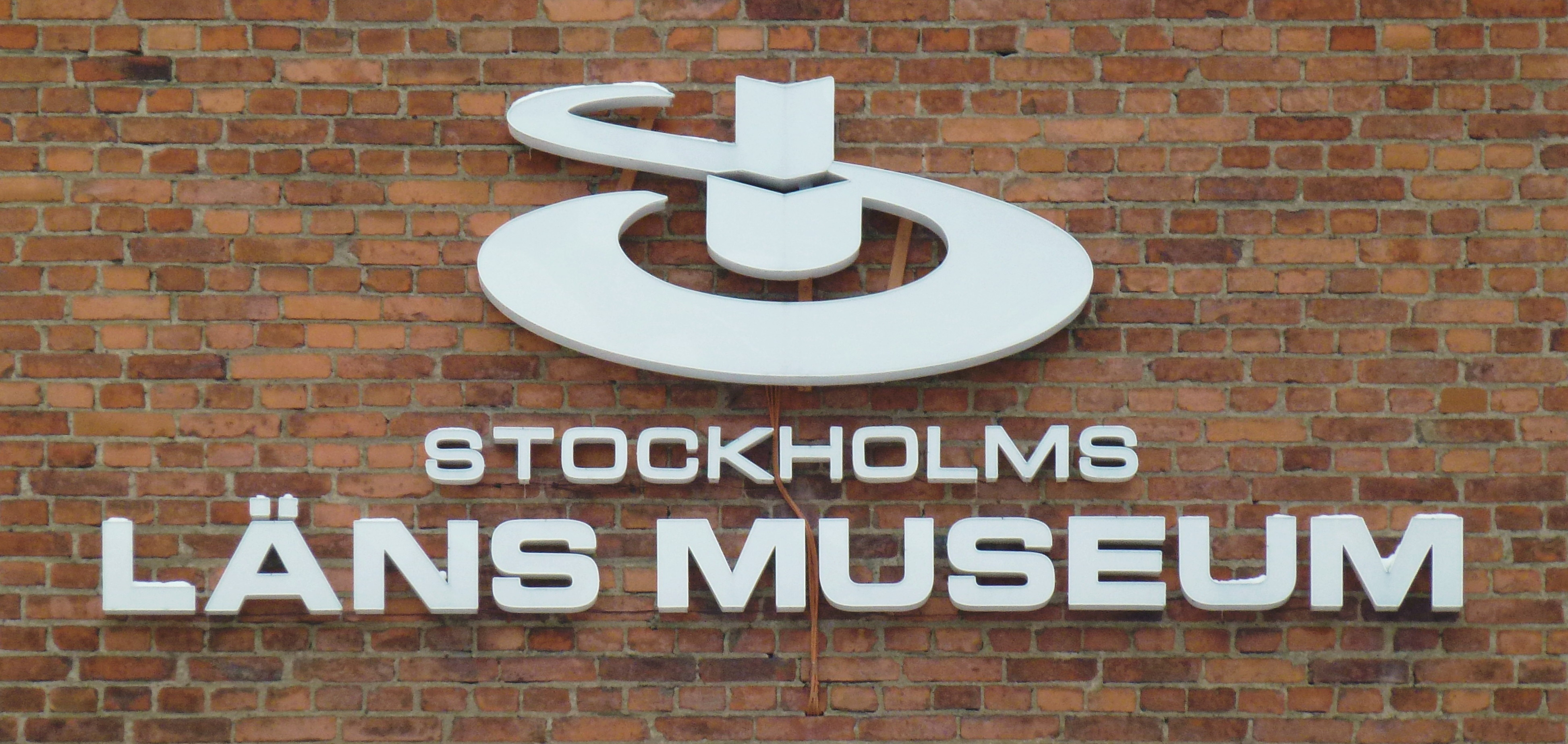 Stockholms läns museum, tidigare belägen i Dieselverkstaden